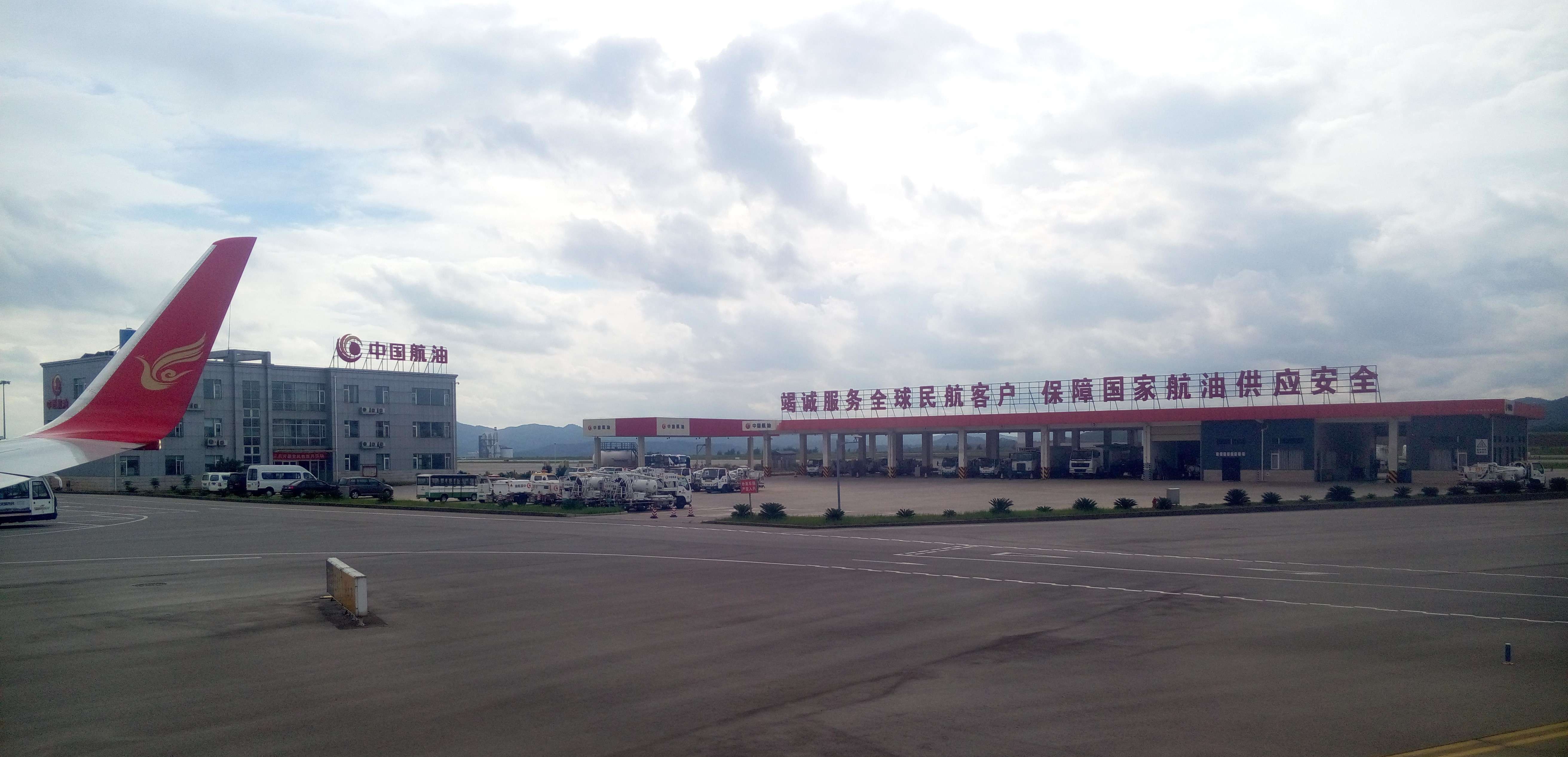 中文（中国大陆）: 上海浦东国际机场空侧的中国航油基地